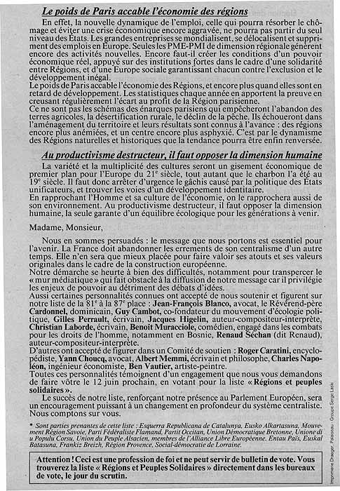 Verso de la profession de foi